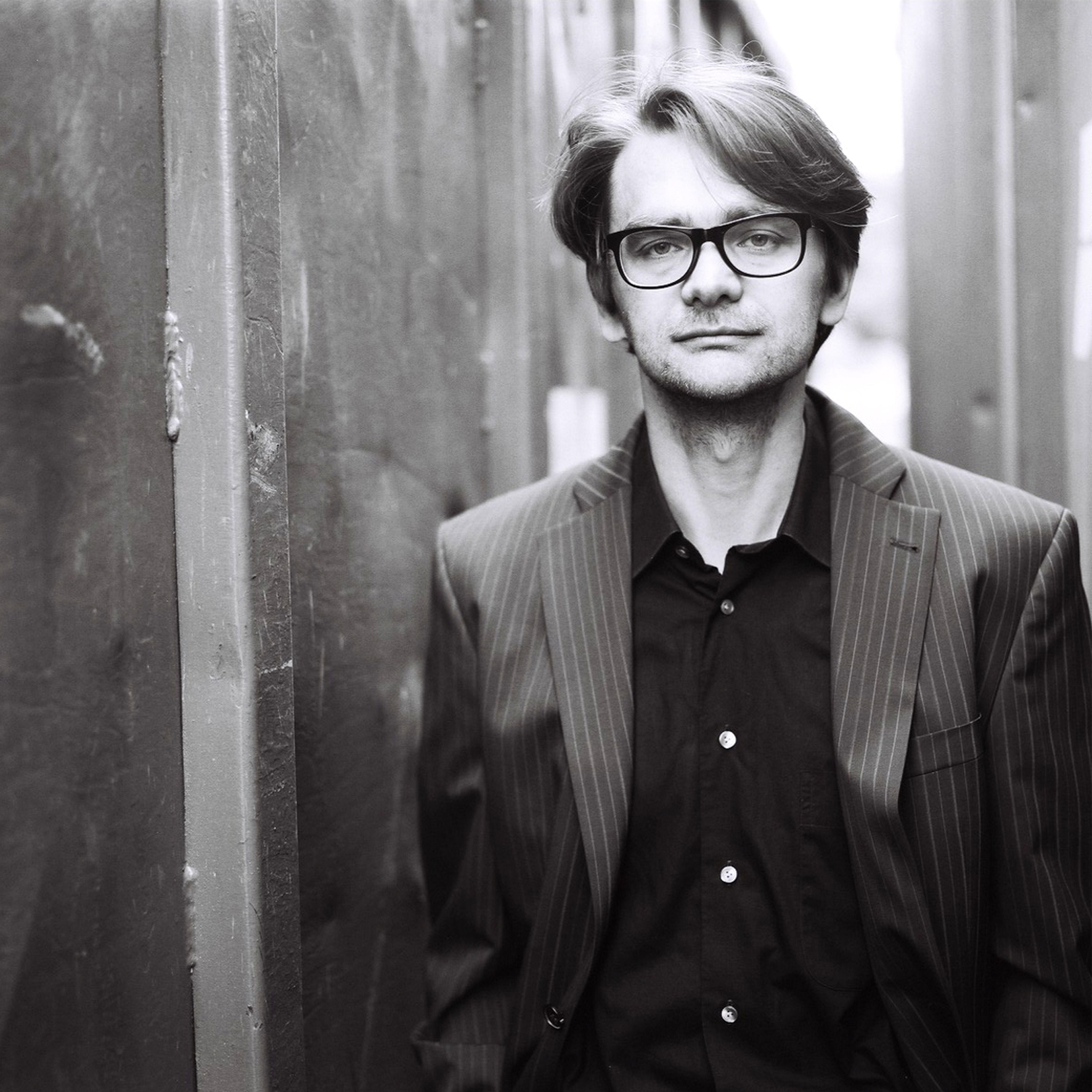 Damir Lukacevic